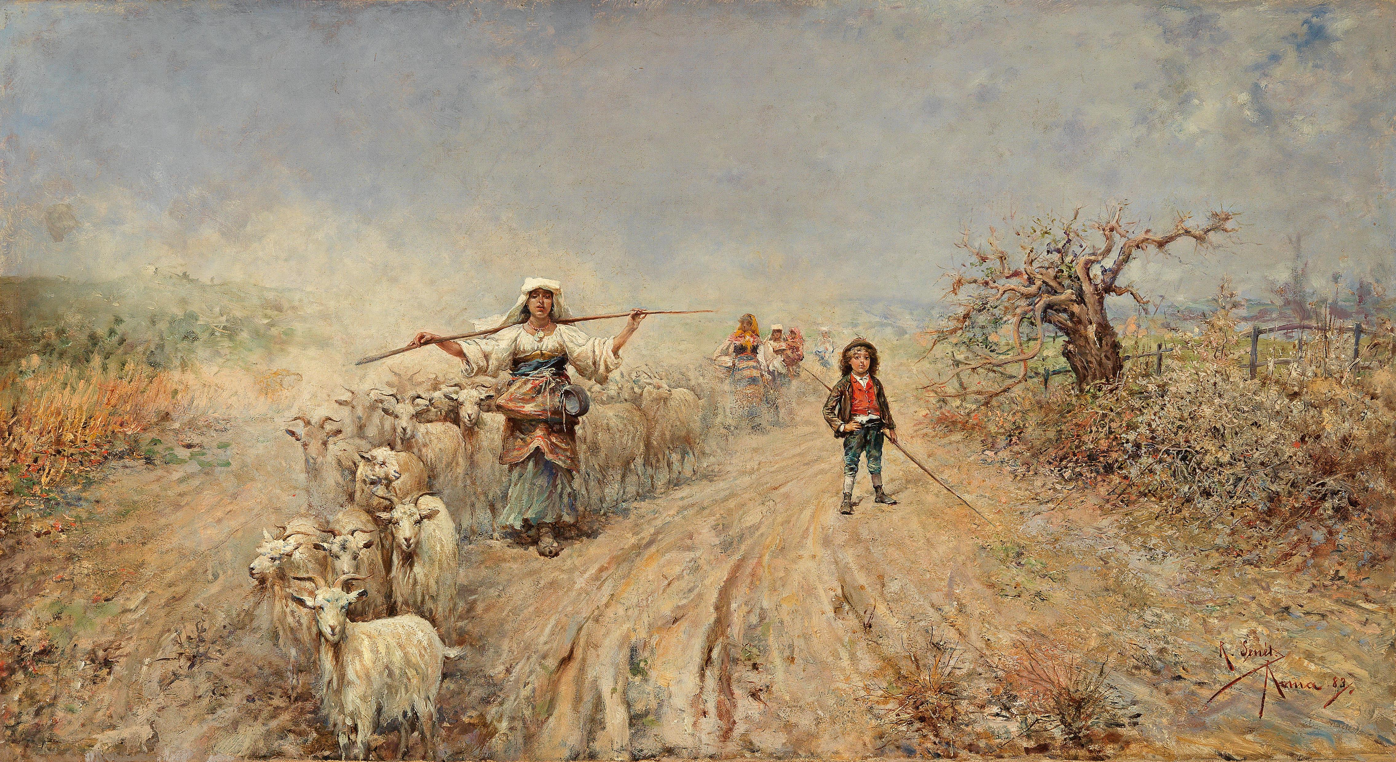 Heimkehr der Herde in der Campagna, signiert, datiert und bezeichnet R. Senet Roma (18)83, Öl auf Leinwand, 54,5 x 98,5 cm